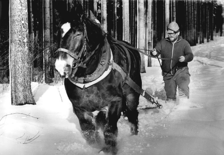 Flöha, Forstarbeit, Bergen von Holz ADN-ZB Thieme 6.2.87 Bez. Karl-Marx-Stadt: Forstwirtschaft. Die extremen Temperaturen und starken Schneefälle im Januar haben an die Forstarbeiter hohe Anforderungen gestellt. Im Forstwirtschaftsbetrieb Flöha gibt es gegenwärtig Schneehöhen zwischen 50 und 80 Zentimeter. Wo die Rücketechnik durch den zu hohen Schnee nicht mehr arbeiten kann, ist der Einsatz von Pferden unersätzlich. Gespannführer Reinhard Voigt, beim Rücken von Stammholz. -siehe auch 1987/0206/1 und 2N